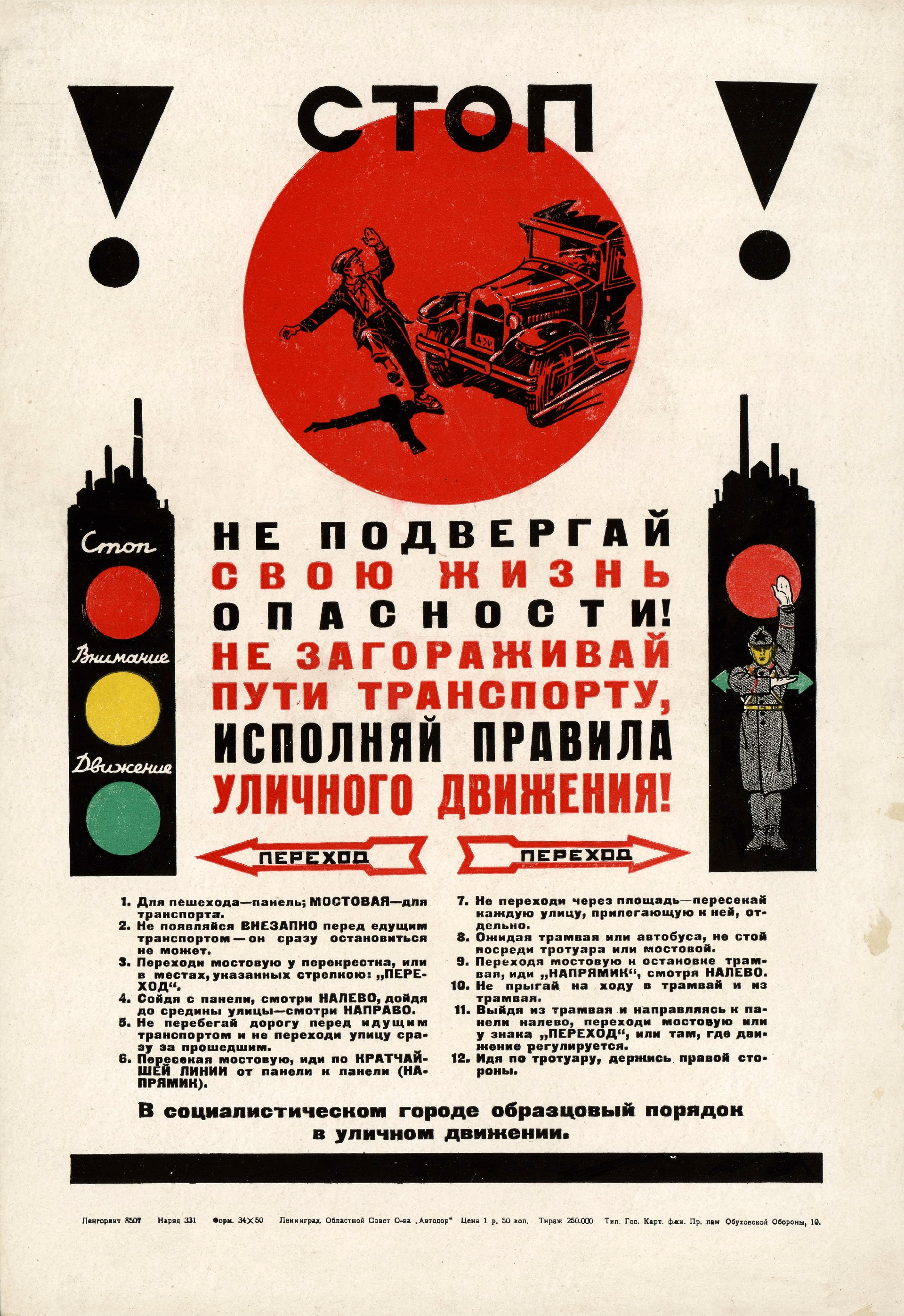 Стоп! Не подвергай свою жизнь опасности! Не загораживай пути транспорту, исполняй правила уличного движения! : [плакат]. — Ленинград : Областной совет общества «Автодор», [1934] (Ленинград : Типография Государственной картографической фабрики). — Цветная литография, 1 лист, 50 × 34 см. — 250 000 экз.